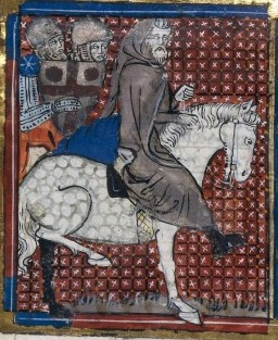 Croisade de Pierre l'Ermite